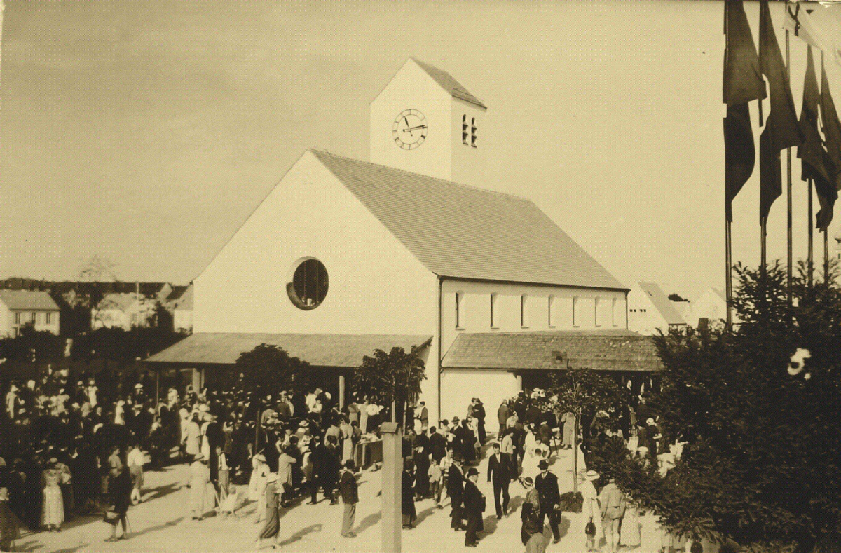 Foto von der Eröffnung der Gustav-Adolf-Kirche München-Ramersdorf am 1. September 1935